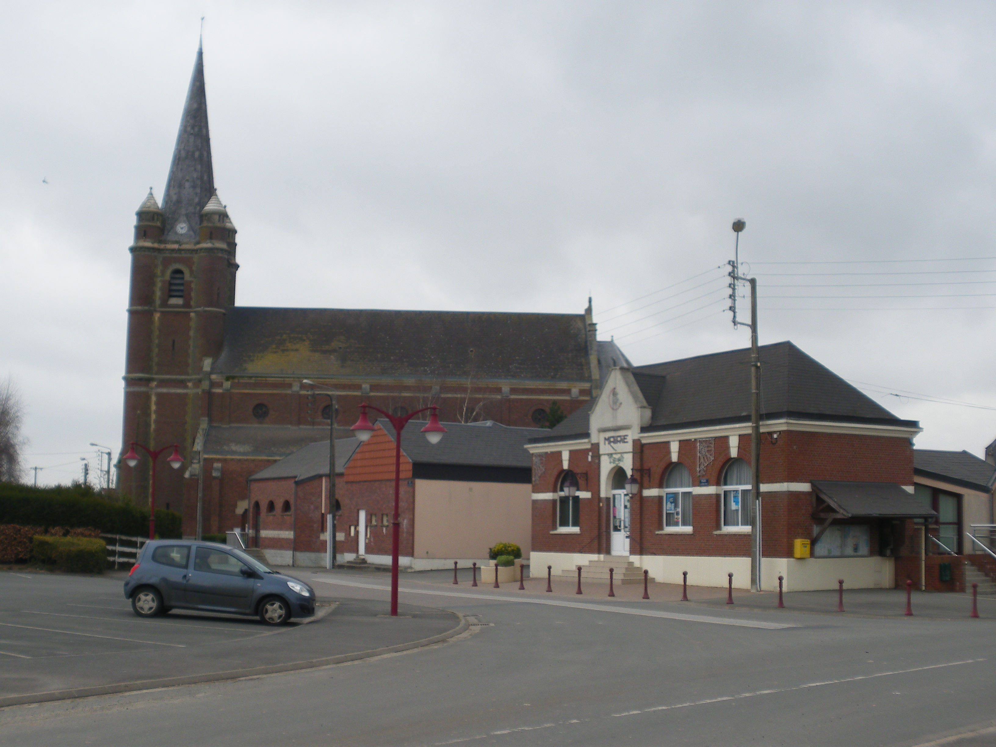 Centre (église + mairie) de la commune de Graincourt-lès-Havrincourt.